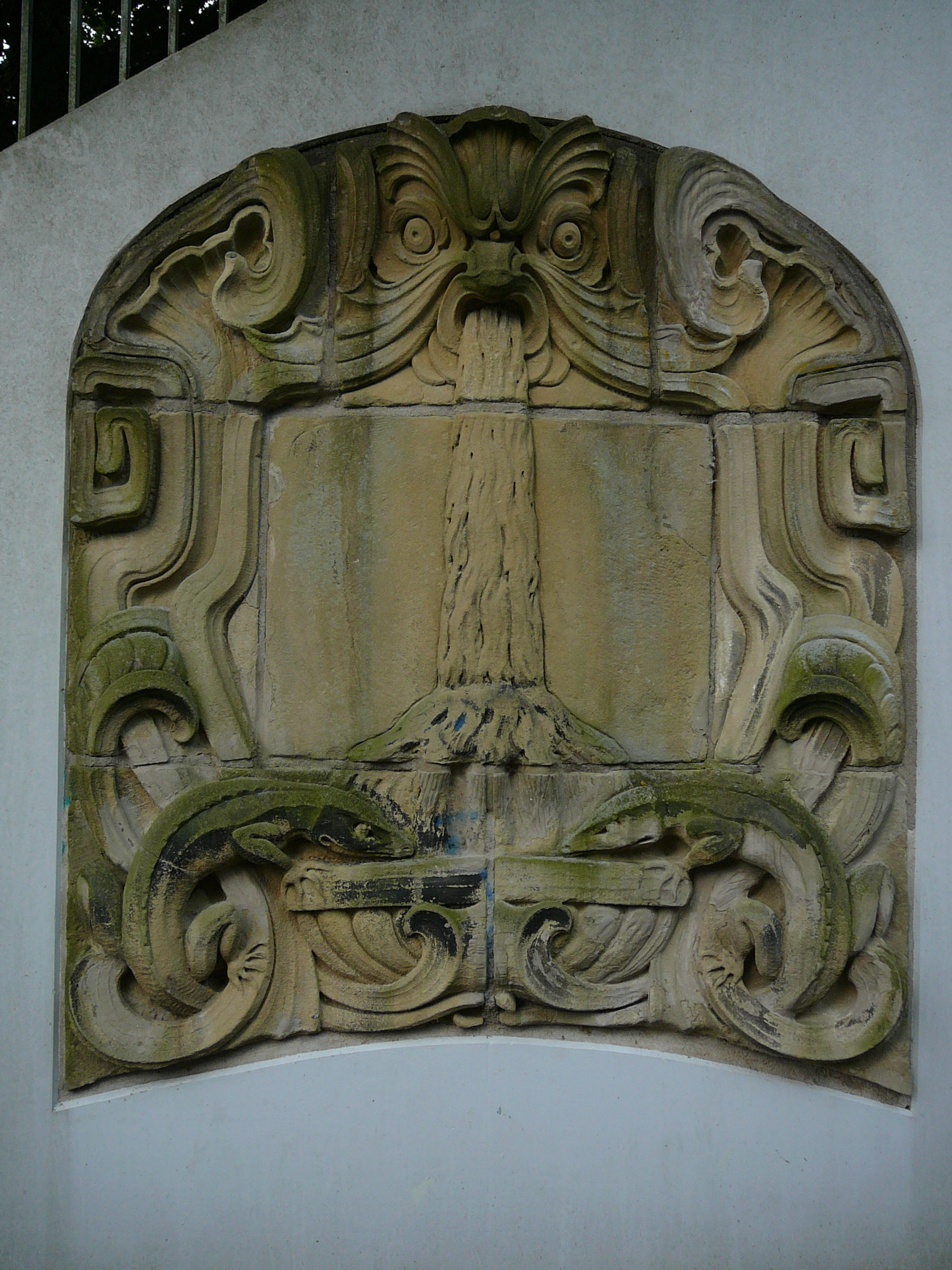 Oberbergische Straße, Wuppertal